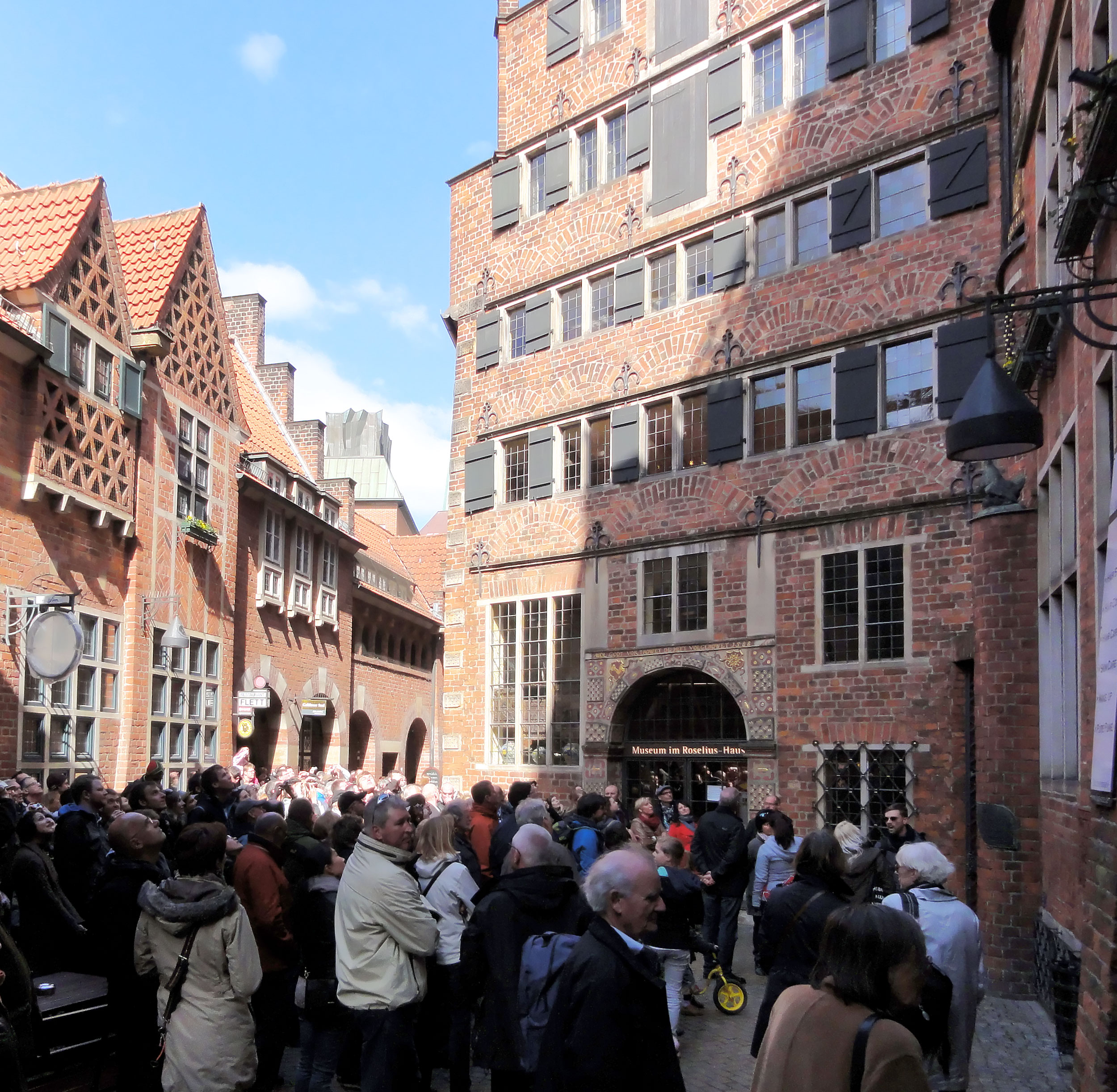 Böttcherstraße in Bremen. Besucher vor dem Glockenspiel